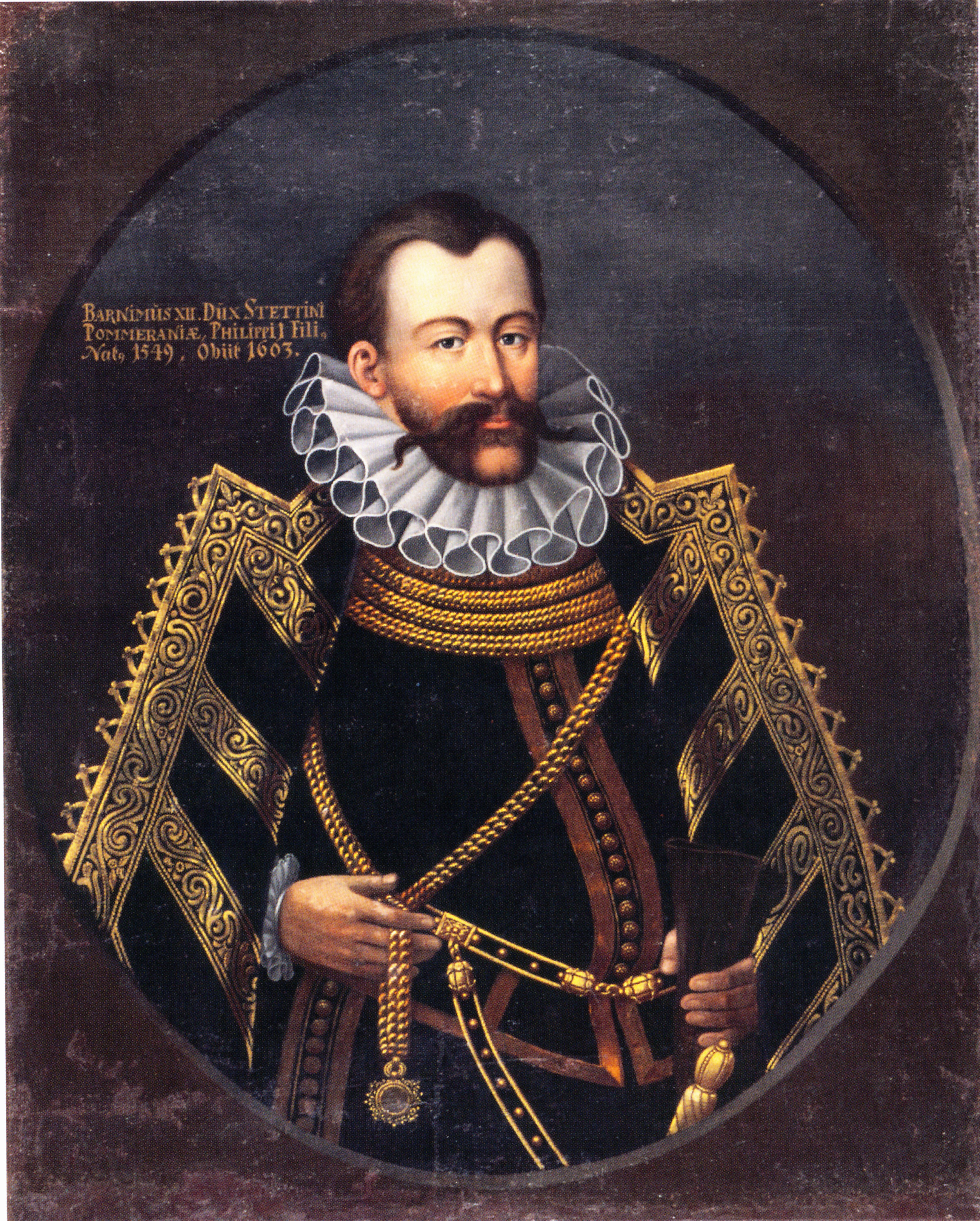 Ölgemälde von Herzog Barnim X. von Pommern, Kopie nach einer Vorlage im Alten Rathaus in Anklam